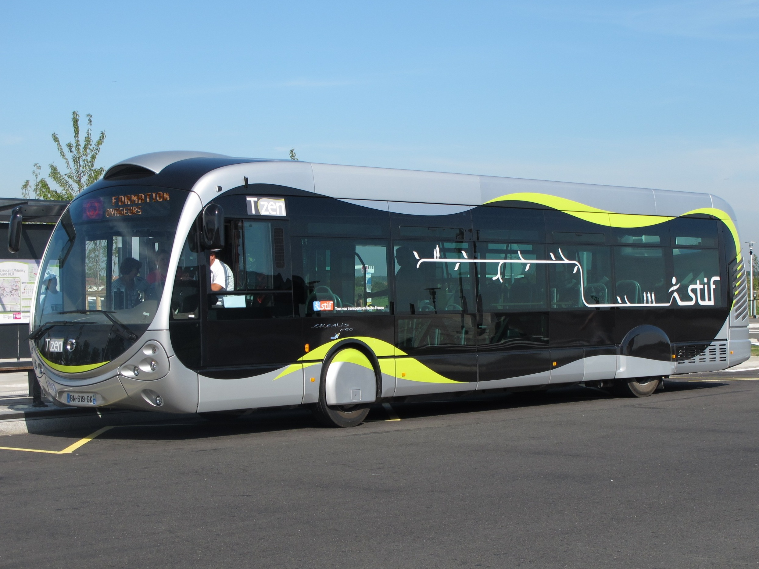 Bus T-ZEN ligne 1 - Gare de Lieusaint (Seine-et-Marne) - Gare de Corbeil-Essonnes (Essonne), France.